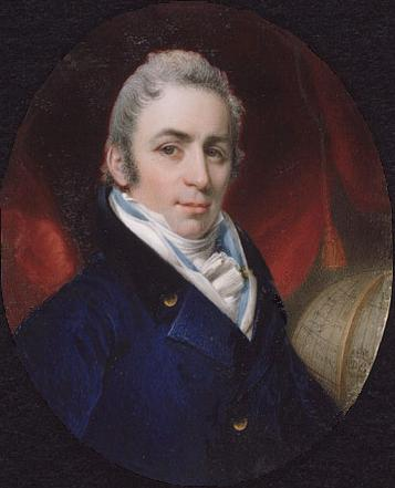 Joseph Bouchette (né le 14 mai 1774, décédé le 8 avril 1841) était un arpenteur, un géographe, un cartographe et un militaire québécois. Arpenteur général du Bas-Canada, il a joué un rôle important dans l'évolution de la topographie de la province de Québec.